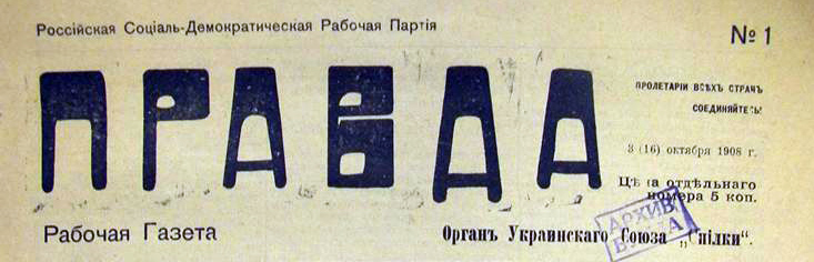 Венская „Правда“ (первый номер, 1908)